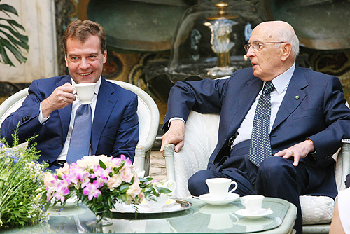 Giorgio Napolitano and Dmitry Medvedev